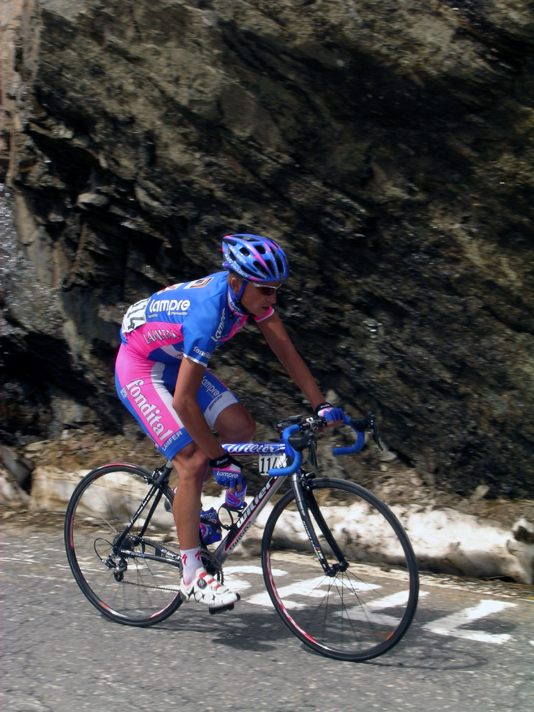 Giro d'Italia 2006 - Evgeni Petrov - Passo Gavia